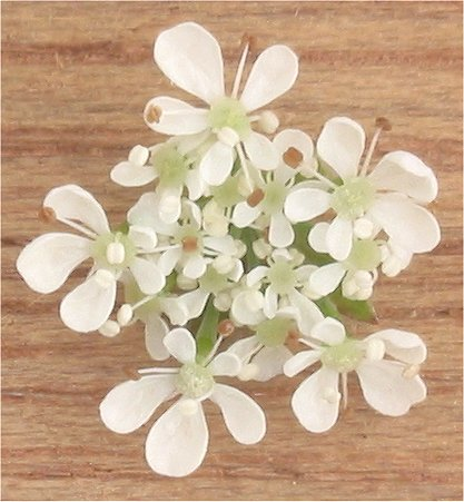 Anthriscus sylvestris Fluitenkruidbloemen